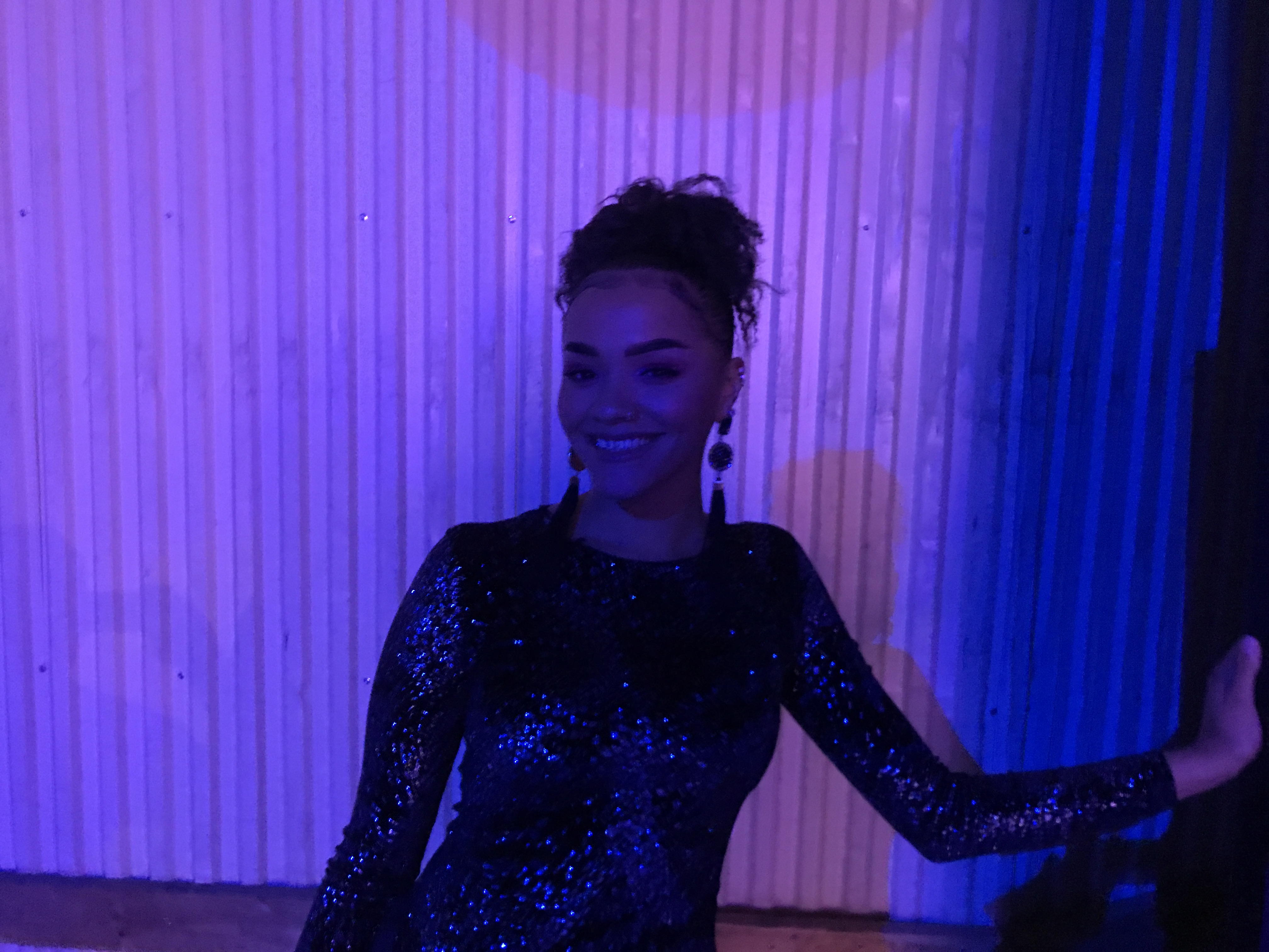 Kadiatou under Idol 2018, precis innan hon sjunger "Say something"